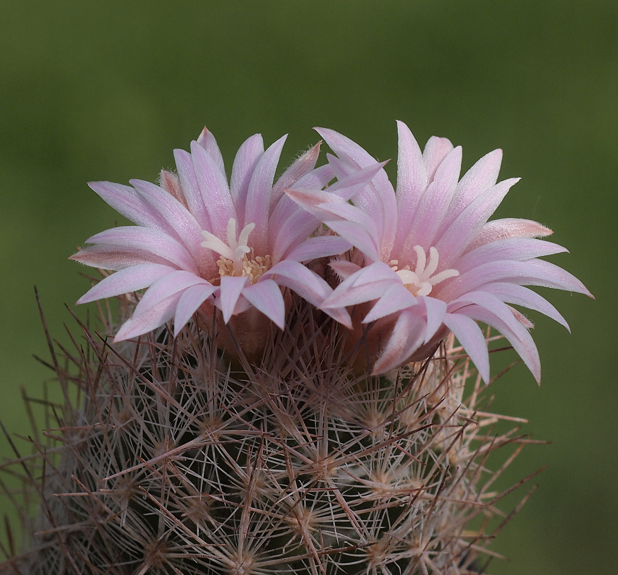 Escobaria chihuahuensis